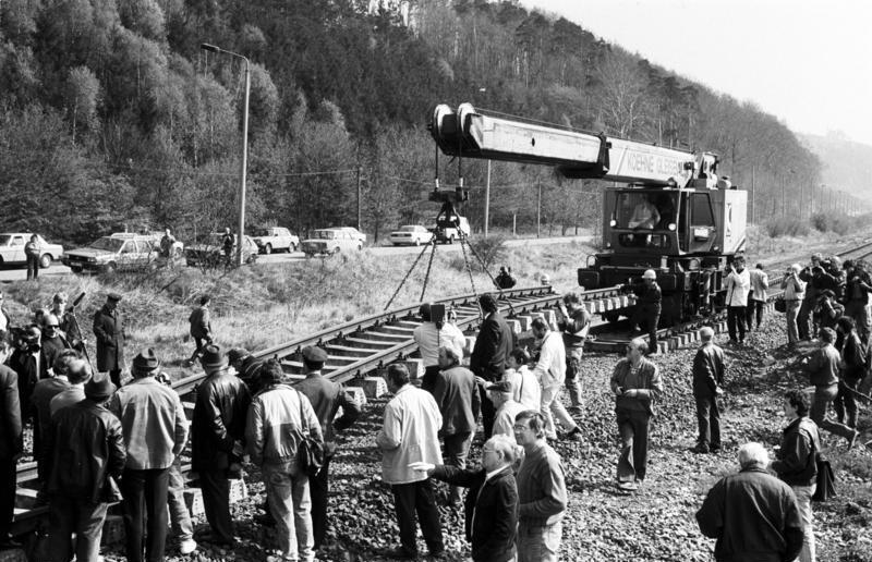 Erfurt, Neue Eisenbahnstrecke ADN/Ludwig/ 26.4.90 Bez. Erfurt: Ab Herbst des Jahres sollen auf der Strecke Eisenach-Wartha-Herleshausen-Gerstungen wieder Züge verkehren. Grünes Licht für den vorerst eingleisigen Ausbau des 1978 stillgelegten deutsch-deutschen Streckenabschnitts mit der Montage eines etwa 15 Meter langen Gleisstückes, das symbolisch die letzte Lücke zwischen den bisher getrennten Verbindungen herstellte.